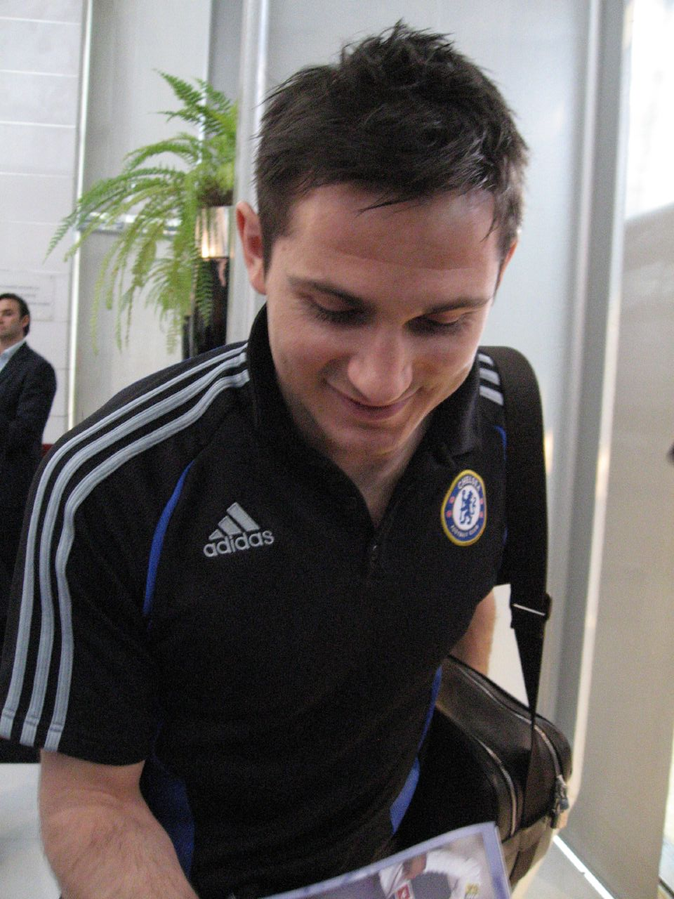 Frank Lampard